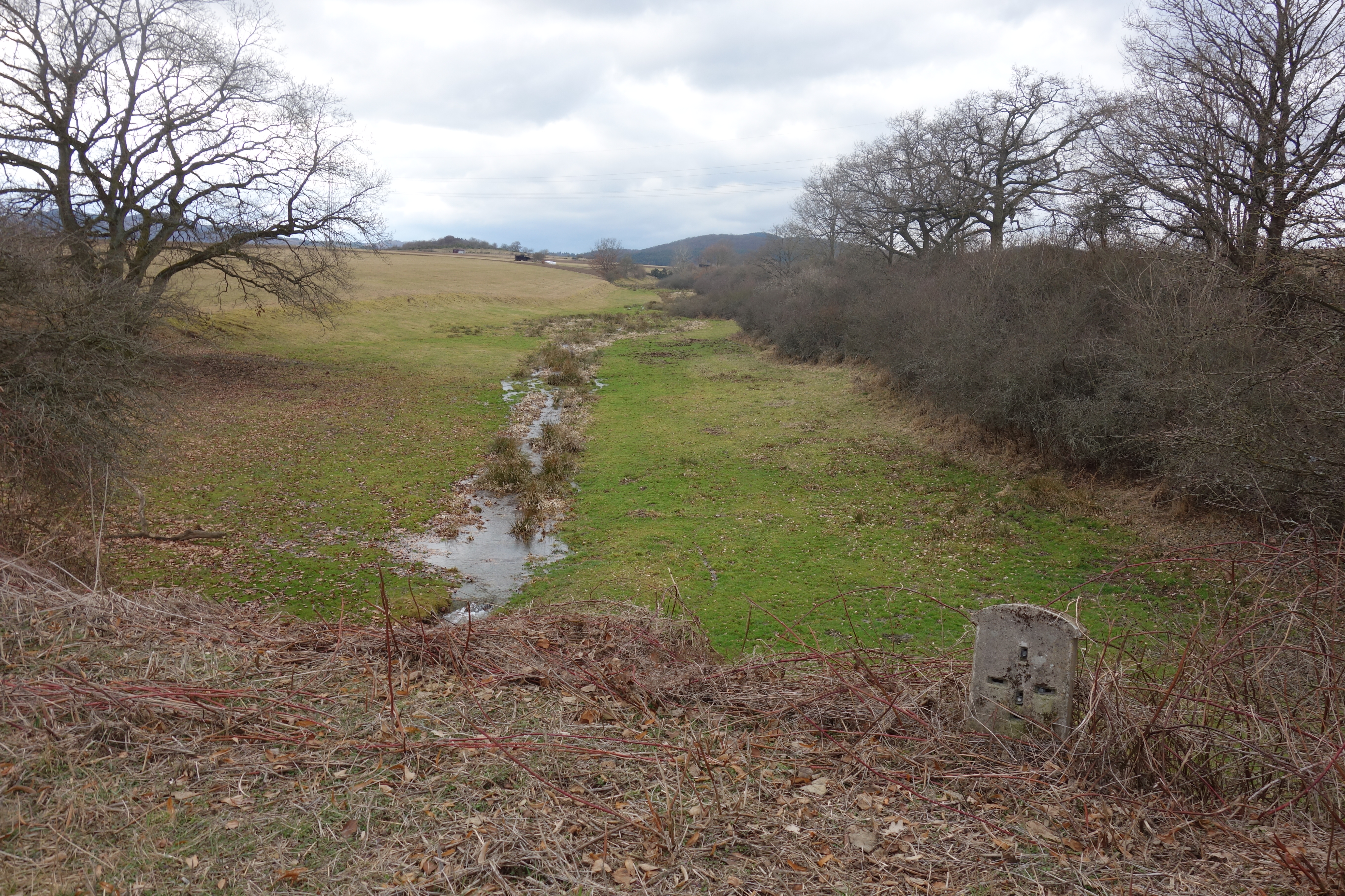 Naturschutzgebiet Auf dem Schleim von Kreisstraße aufgenommen.